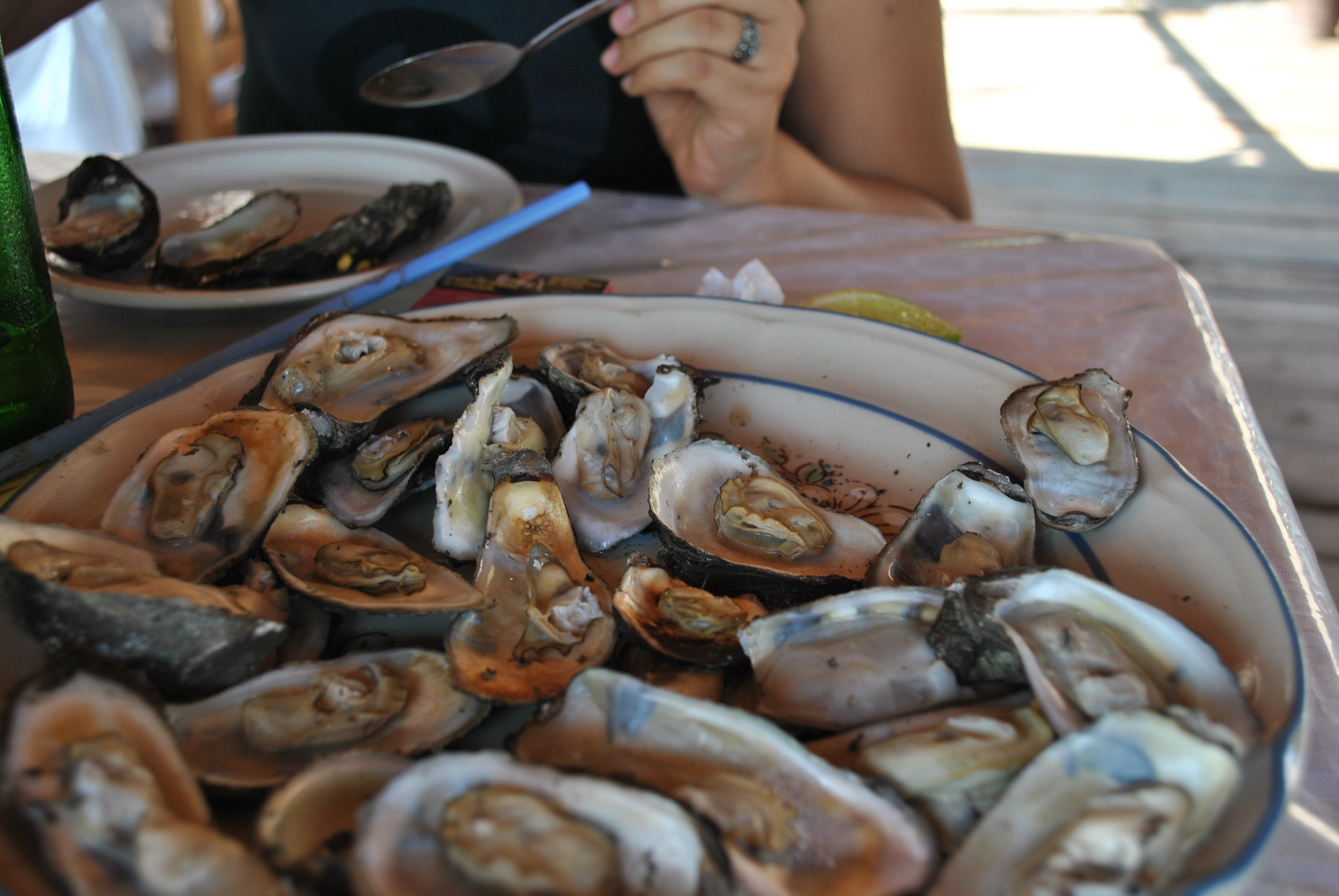 Ostiones en Paraíso, Tabasco